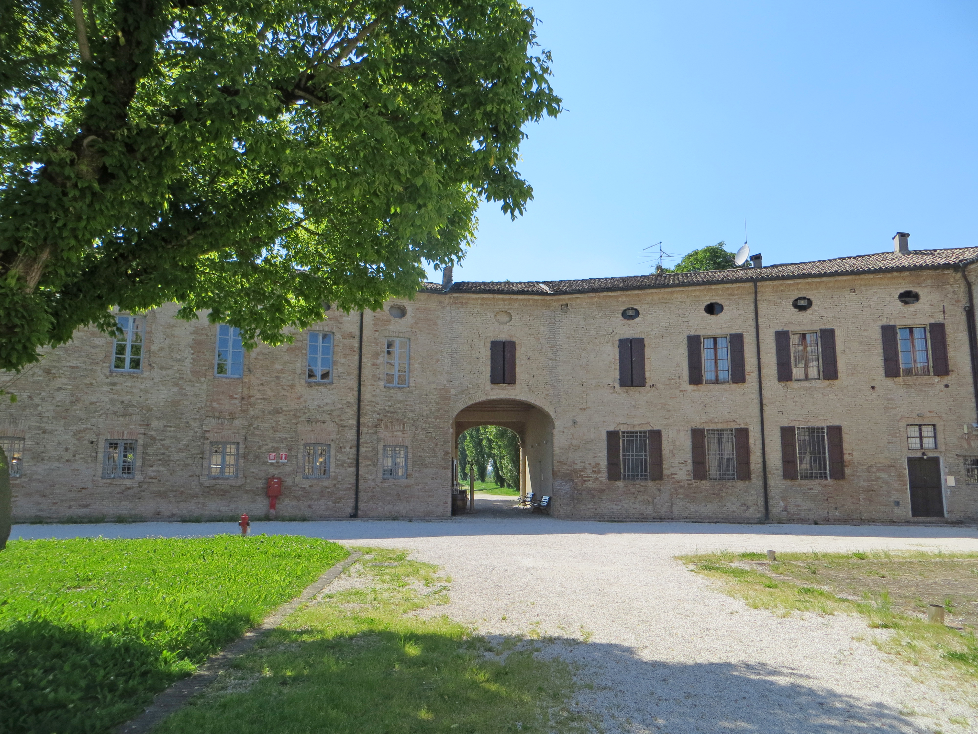 Abbazia di Valserena (Paradigna - Parma) - corte delle Sculture (lati ovest)